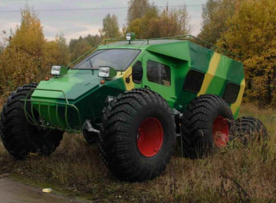 Лопасня XL — вездеход-амфибия на шинах сверхнизкого давления.